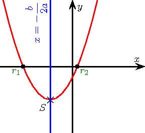 Parabole dans le cas et